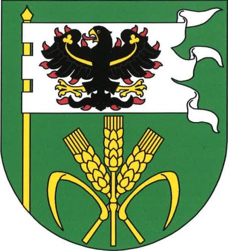 Václavice znak